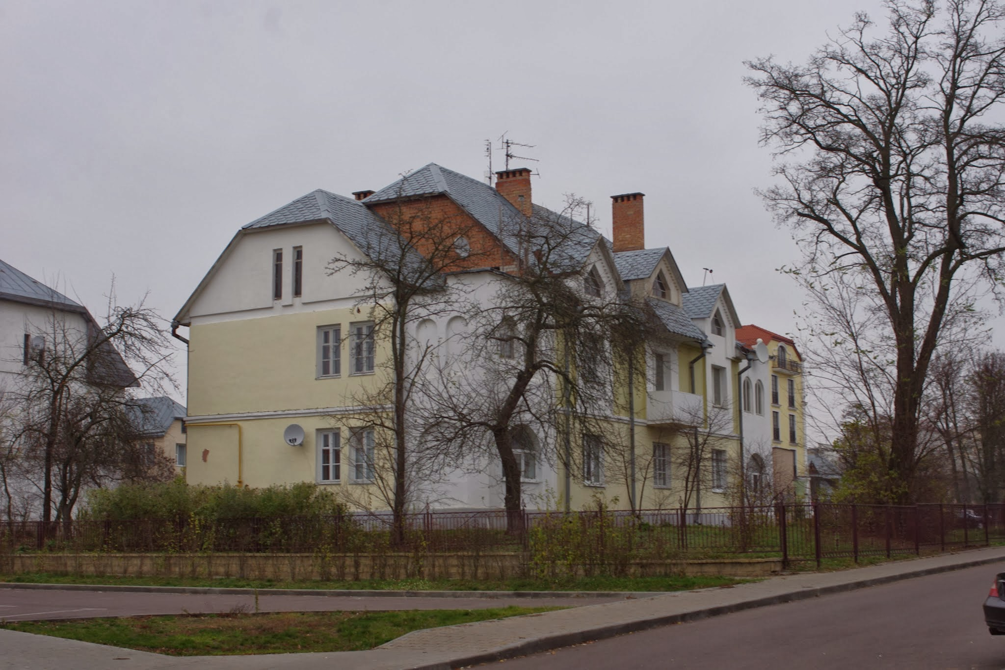 Lieninski rajon, Brest, Belarus